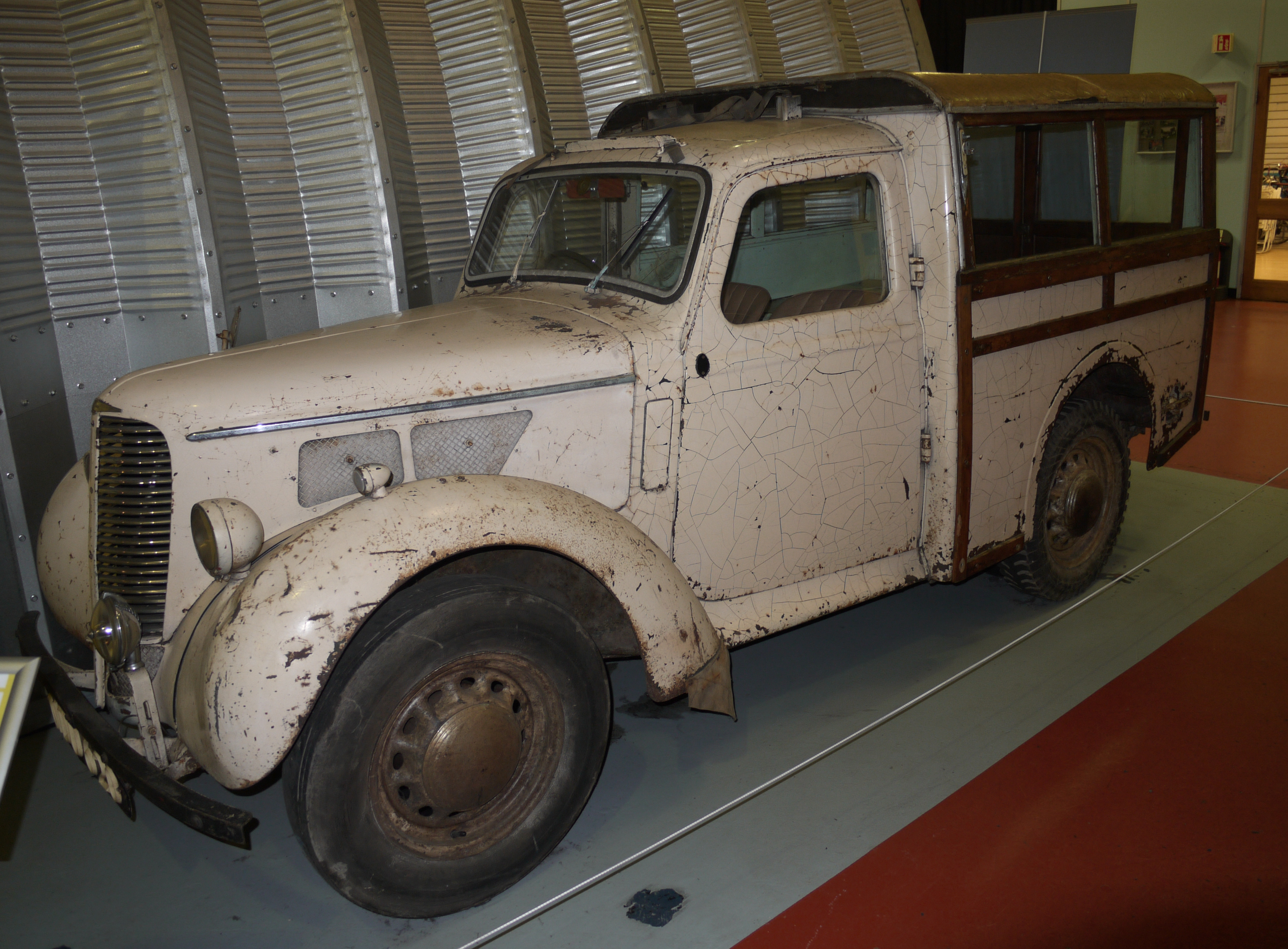 WW2 Hillman utility vehicle aka Tilly